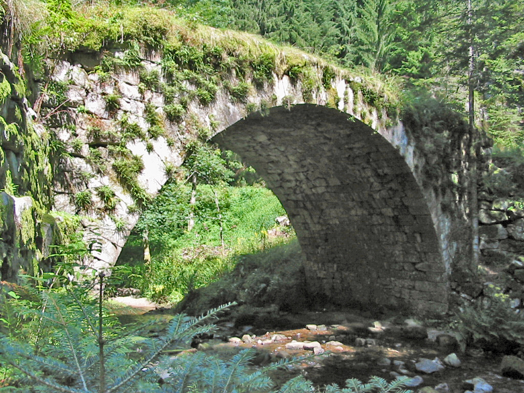 Gérardmer (département des Vosges, France). Le Pont des Fées, sur la Vologne.